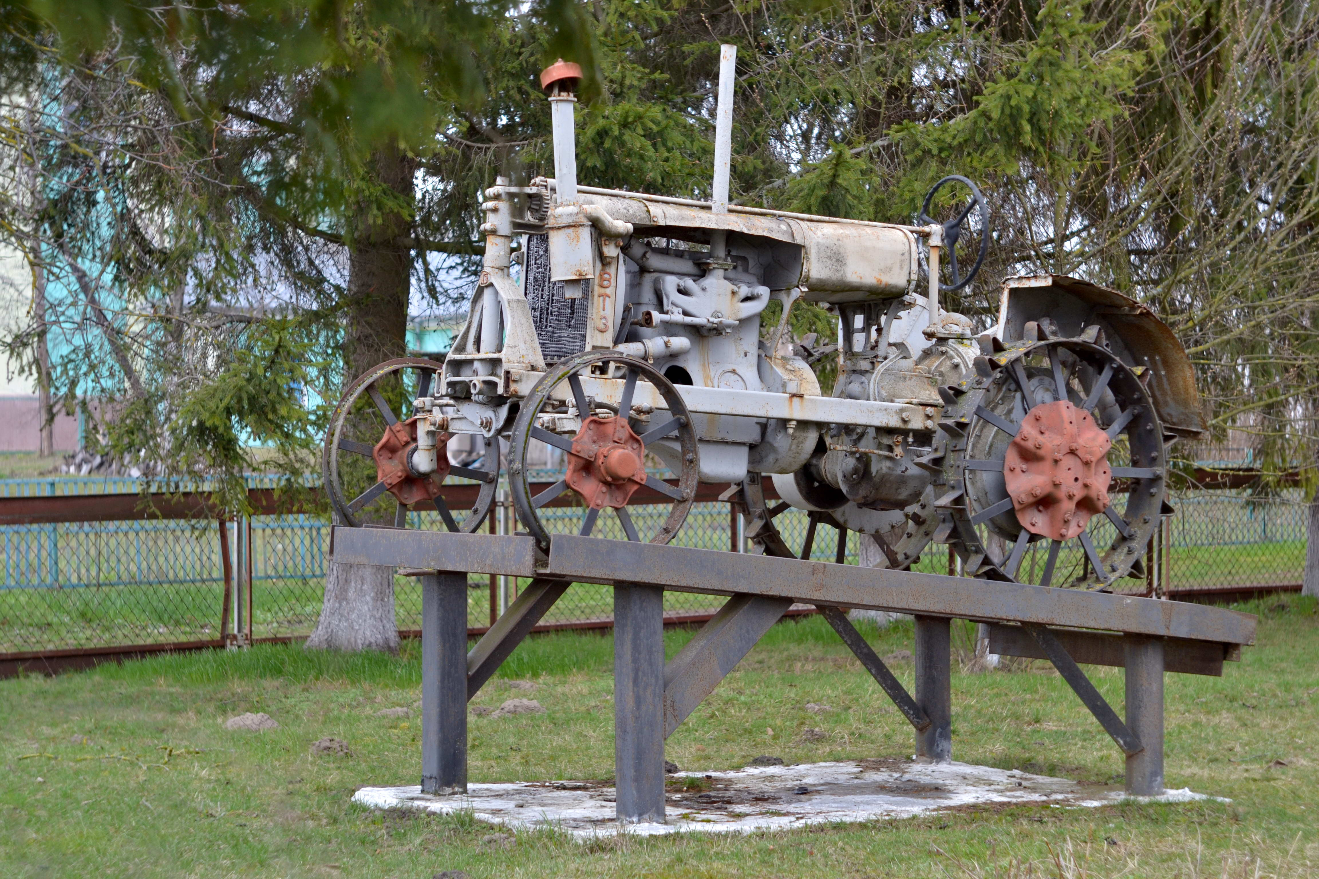 Пам’ятник на честь перших трактористів, які працювали на полях Волині (1966 рік) - загальний вигляд - Радехів Любомльський район Волинська область Україна